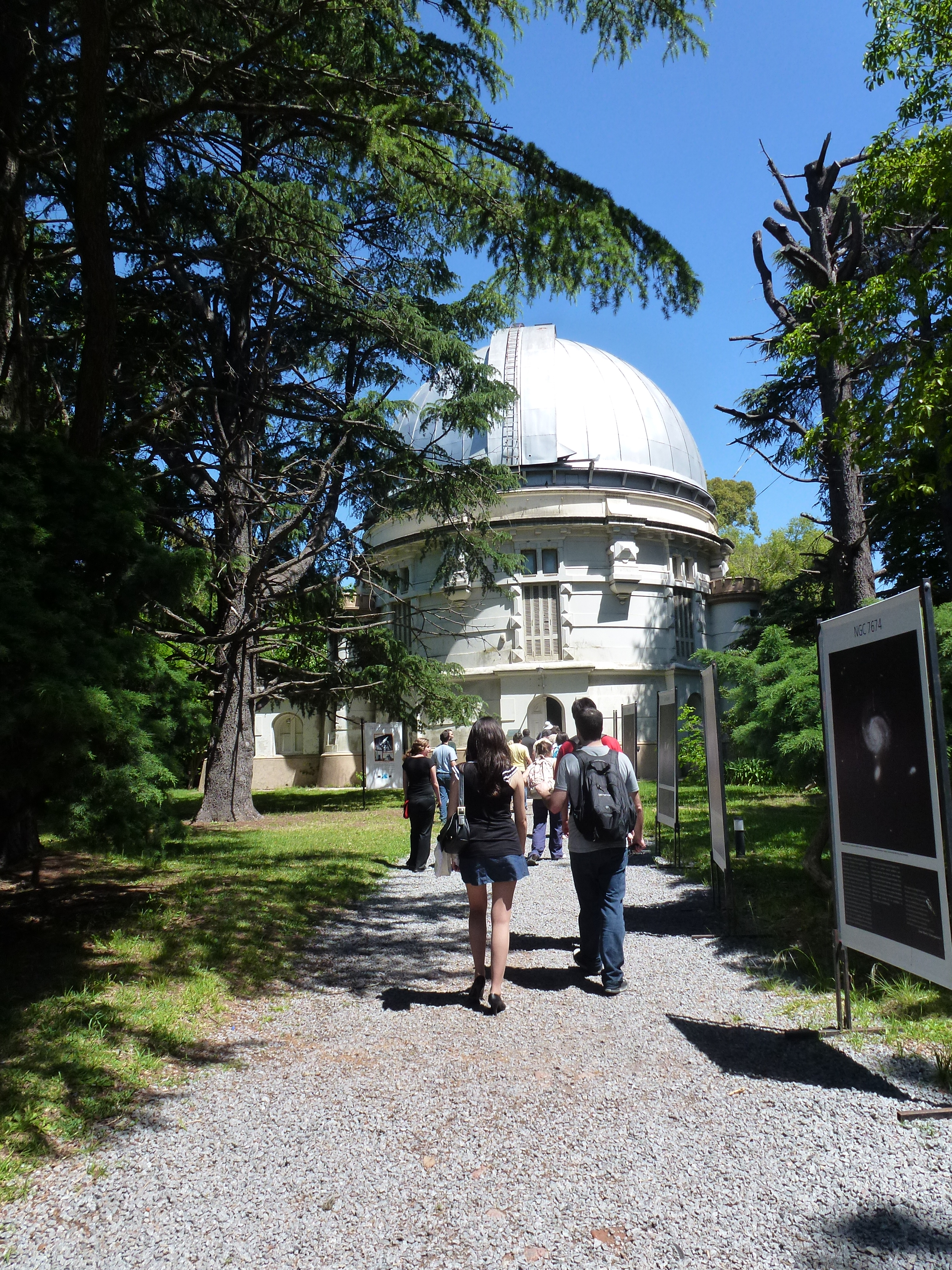 Wikipedia invade el Observatorio Astronómico de La Plata.